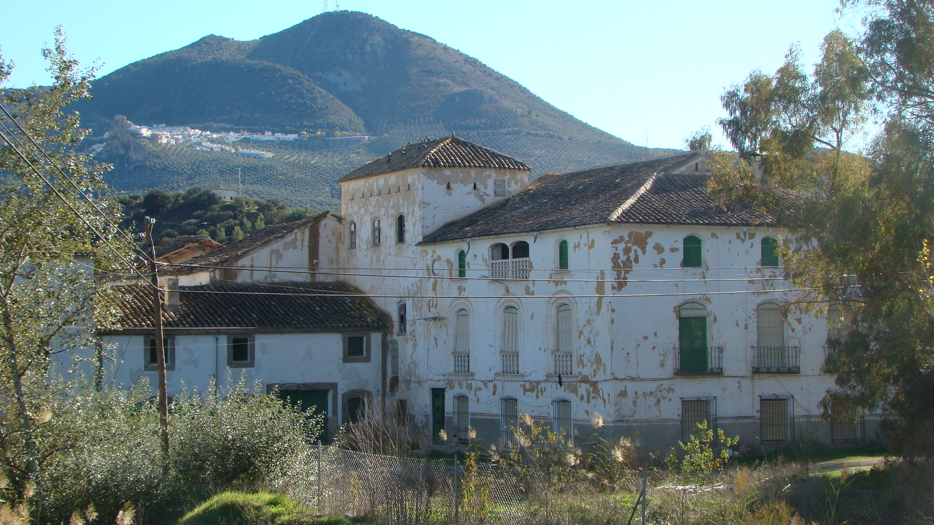 Casería de Olivar situada cerca del pueblo de Solera (Jaén - España)